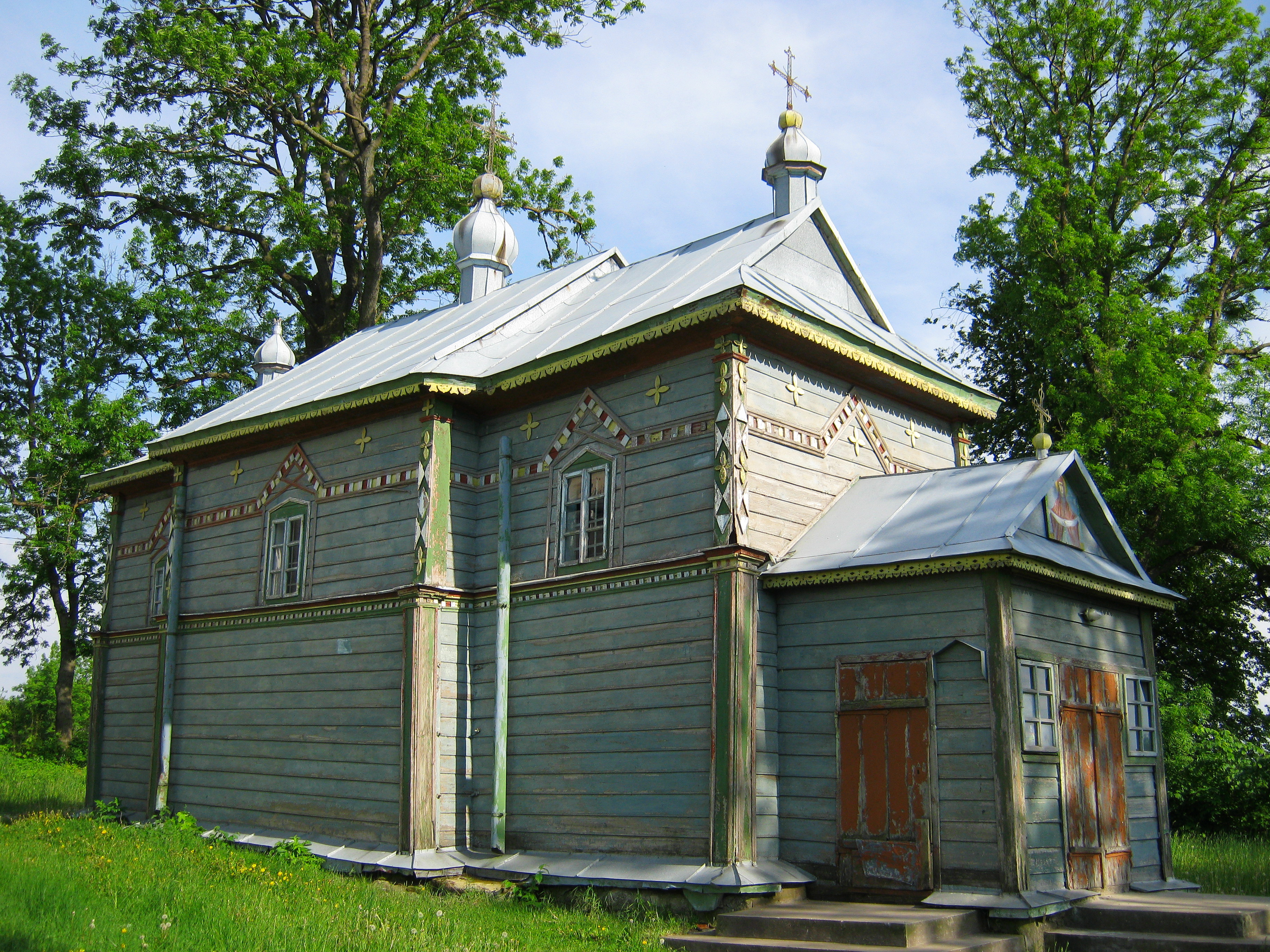 Дерев'яна церква в Мусорівцях(1725)